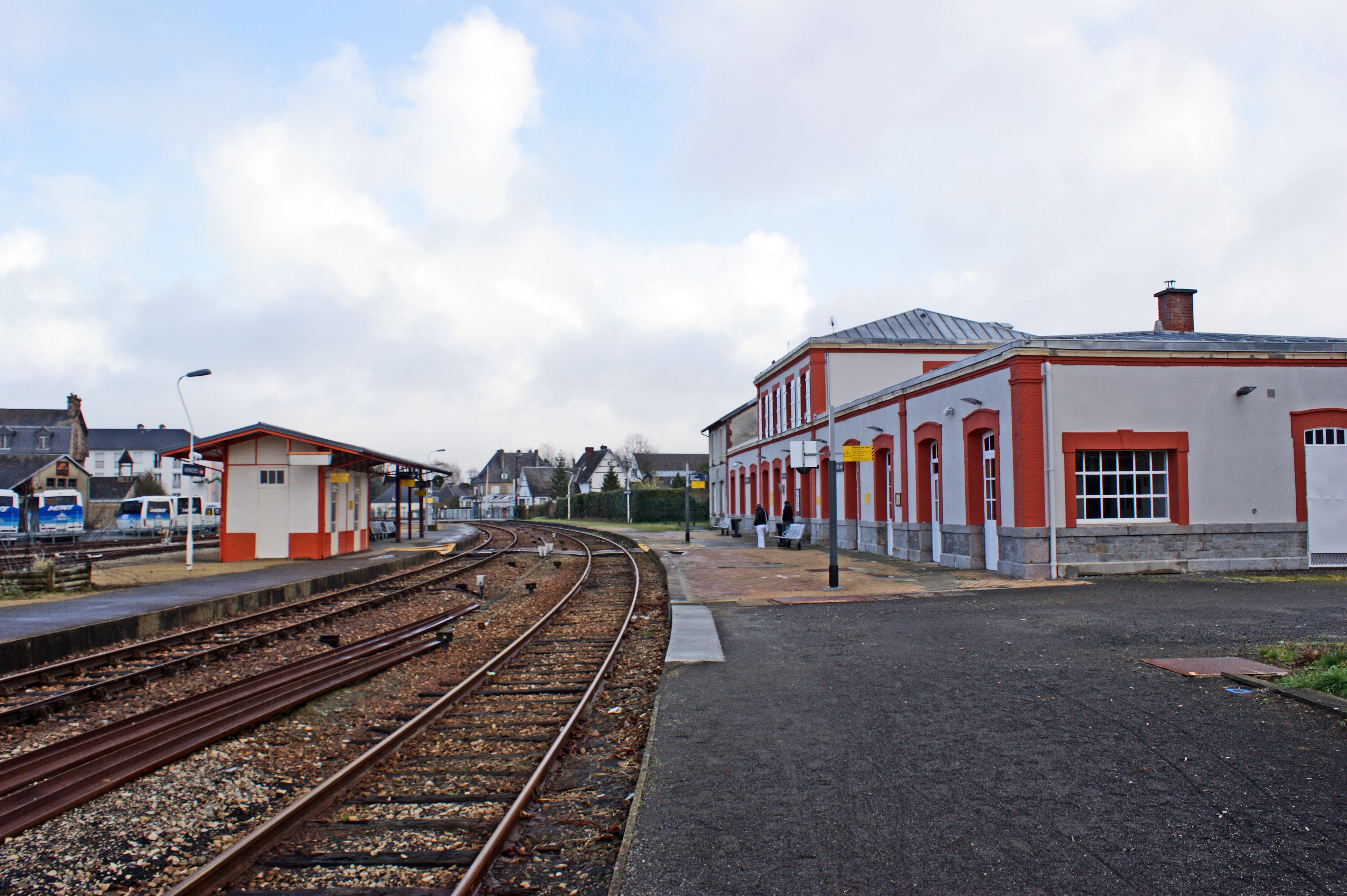 Gare d'Avranches, voies, quais et bâtiment voyageurs. Vue en direction de Lison et Caen.